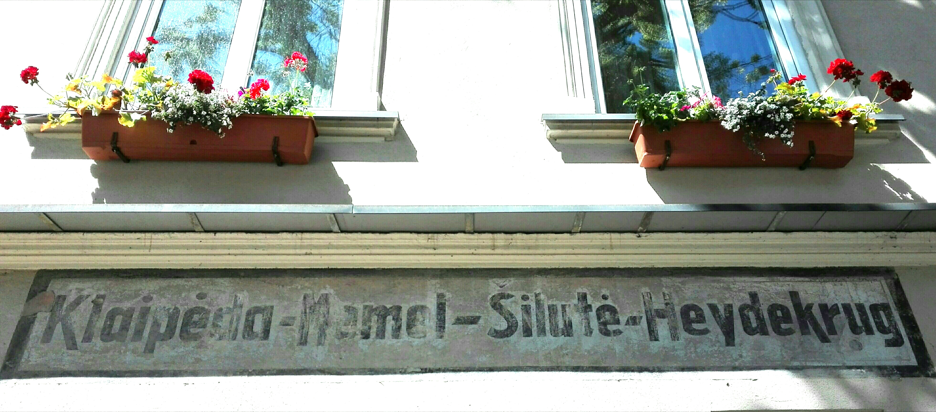 Lietuviškas ir vokiškas užrašas ant pastato Šilutėje